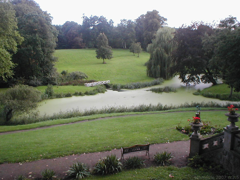 Schlosspark in Kittendorf, Mecklenburg-Vorpommern, Deutschland